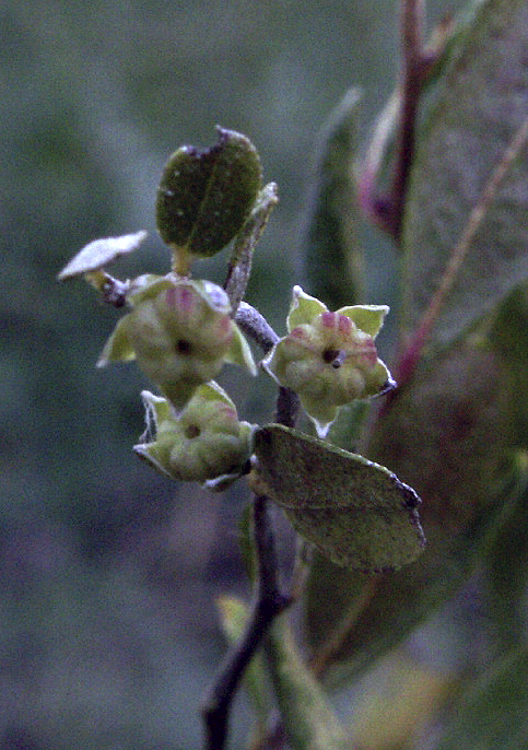 Fruechte der Torfgraenke